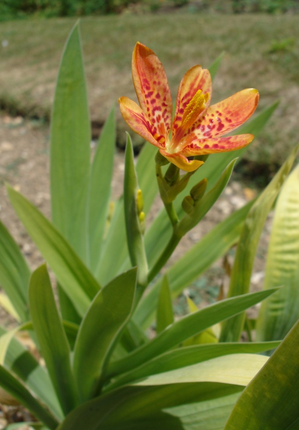 Belamcanda chinensis, Jardin des Plantes de Paris